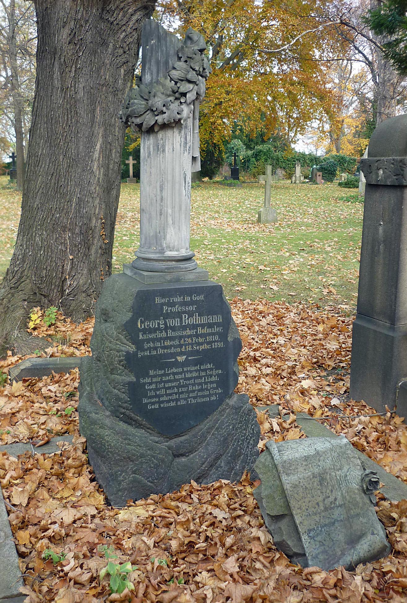 Grabstätte von Prof. Bothmann